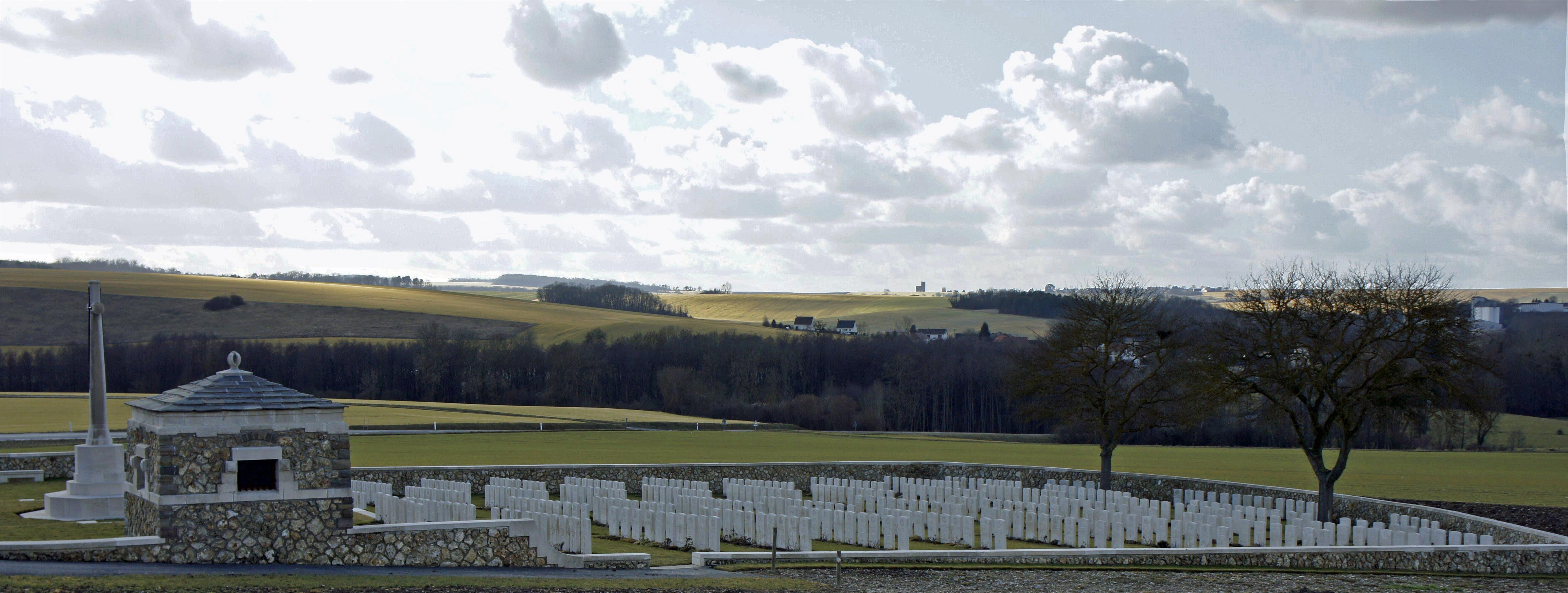 Vue du British cemetery et du village de Chambrecy.